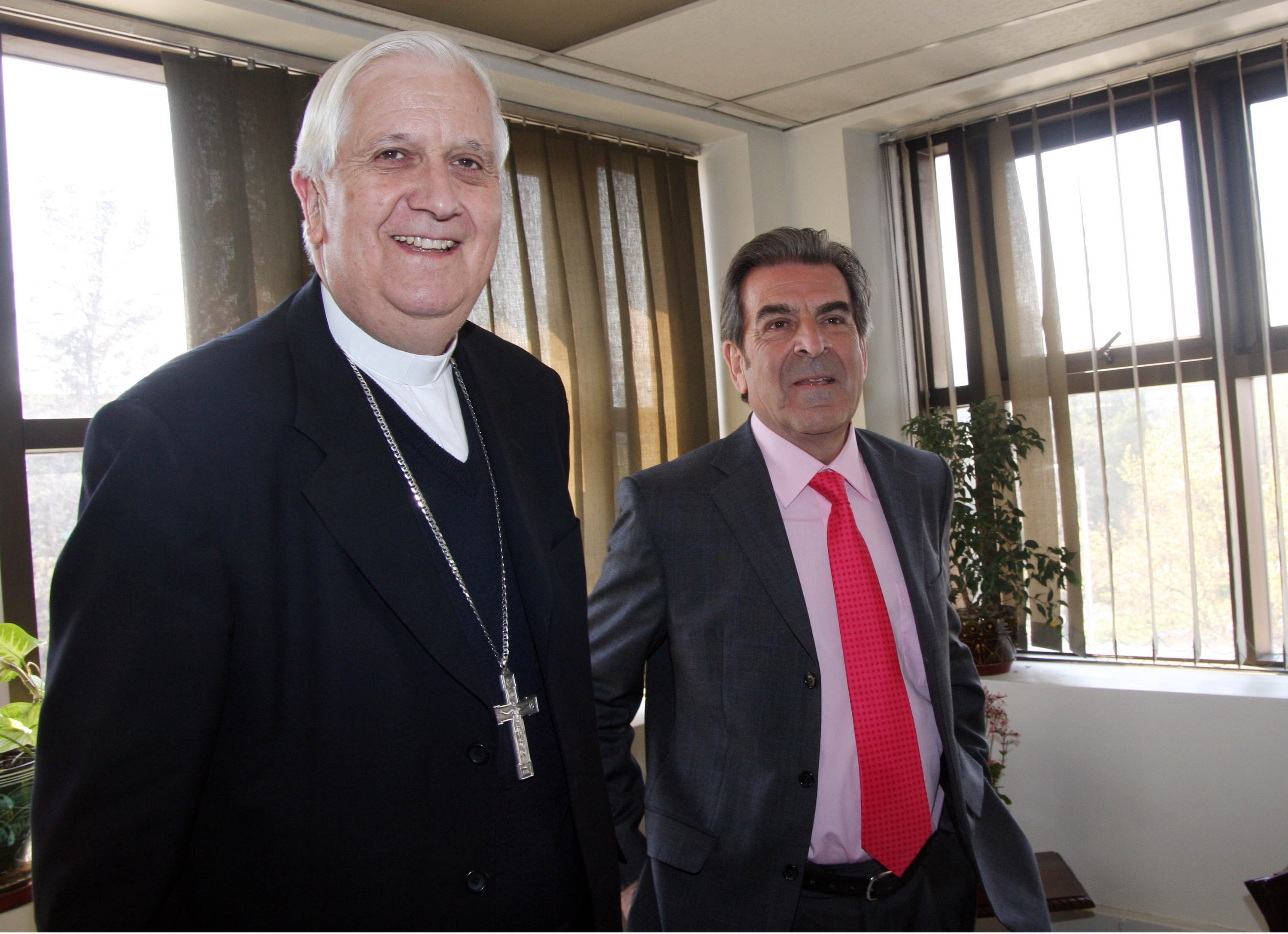 Eduardo Frei con obispos presentó reforma laboral.